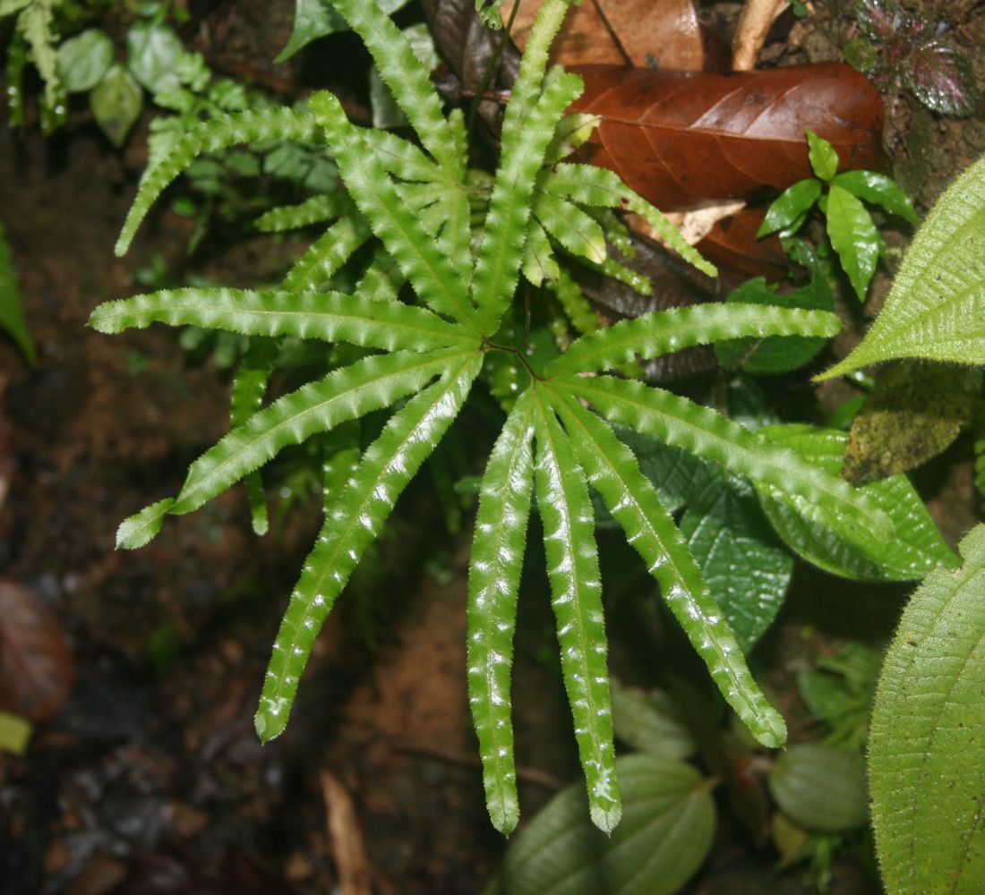 Lygodium radiatum, Lygodiaceae - Costa Rica: Prov. Puntarenas, La Gamba NW Golfito, "Ozelot Trail" W "Esquinas Rainforest Lodge"